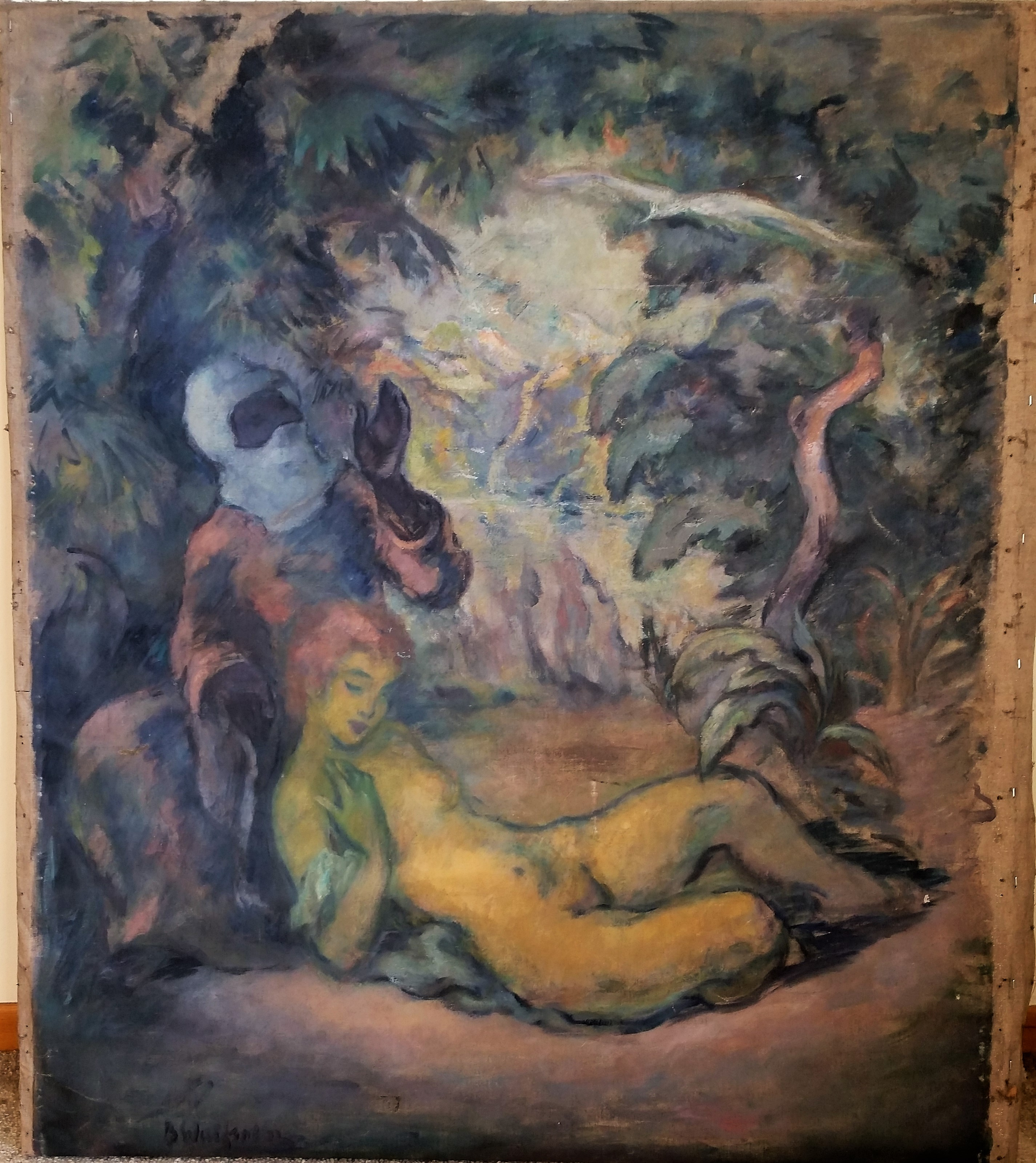 Gemälde in Privatbesitz